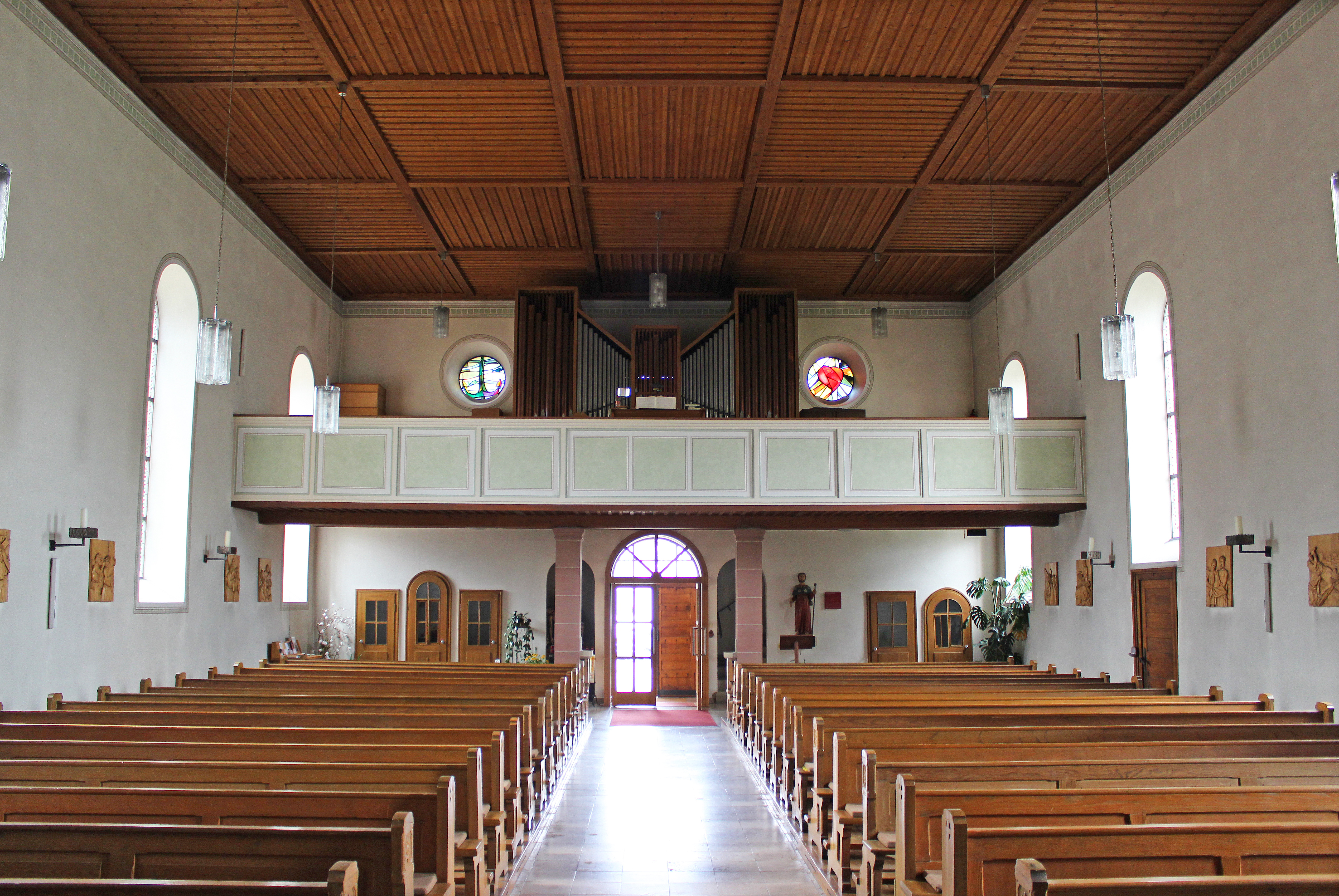 Blick ins Innere der katholischen Pfarrkirche St. Andreas in Altheim, einem Stadtteil von Blieskastel, Saarpfalz-Kreis, Saarland